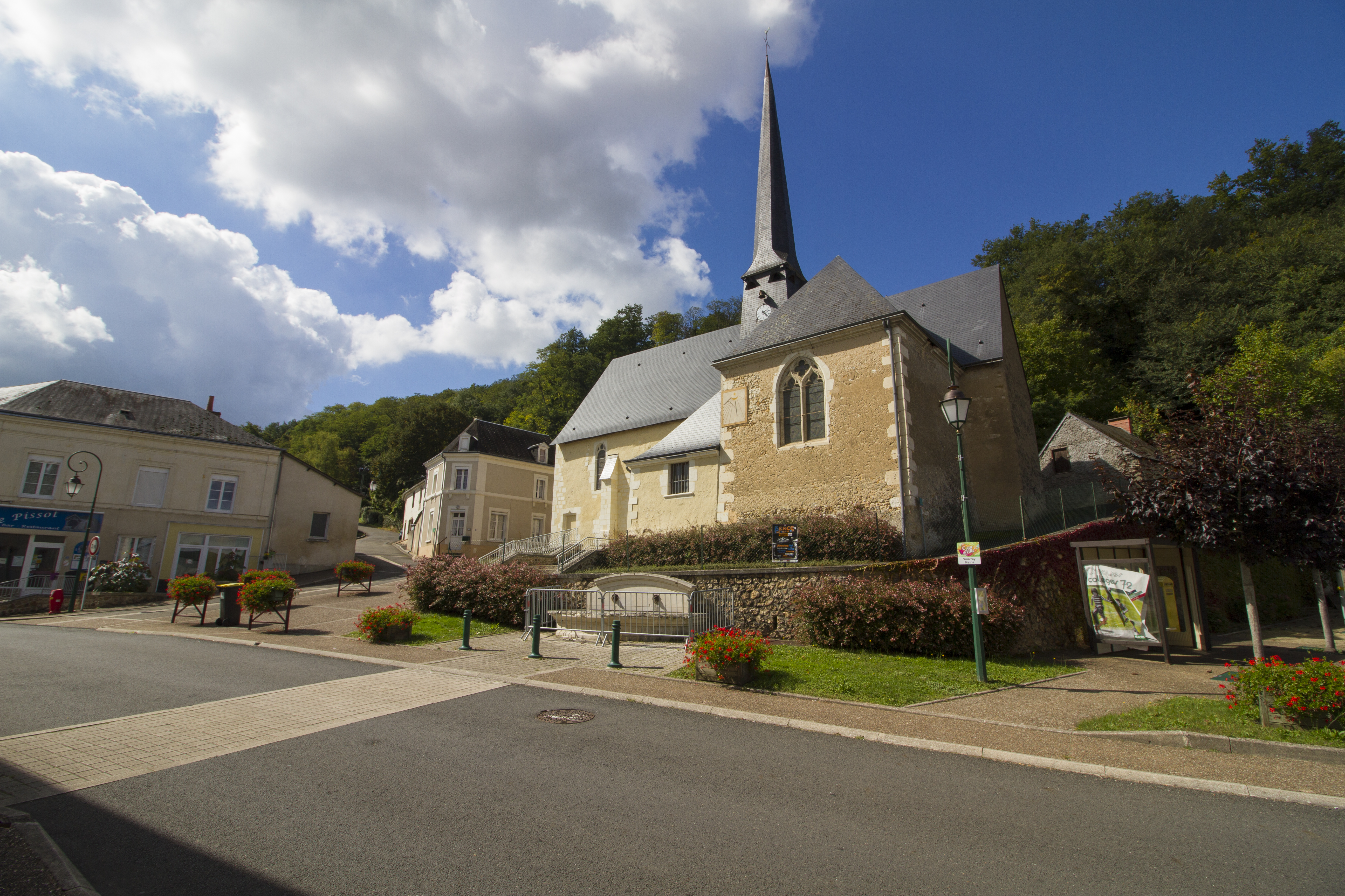 Eglise de Vouvray-sur-Loir - Sarthe